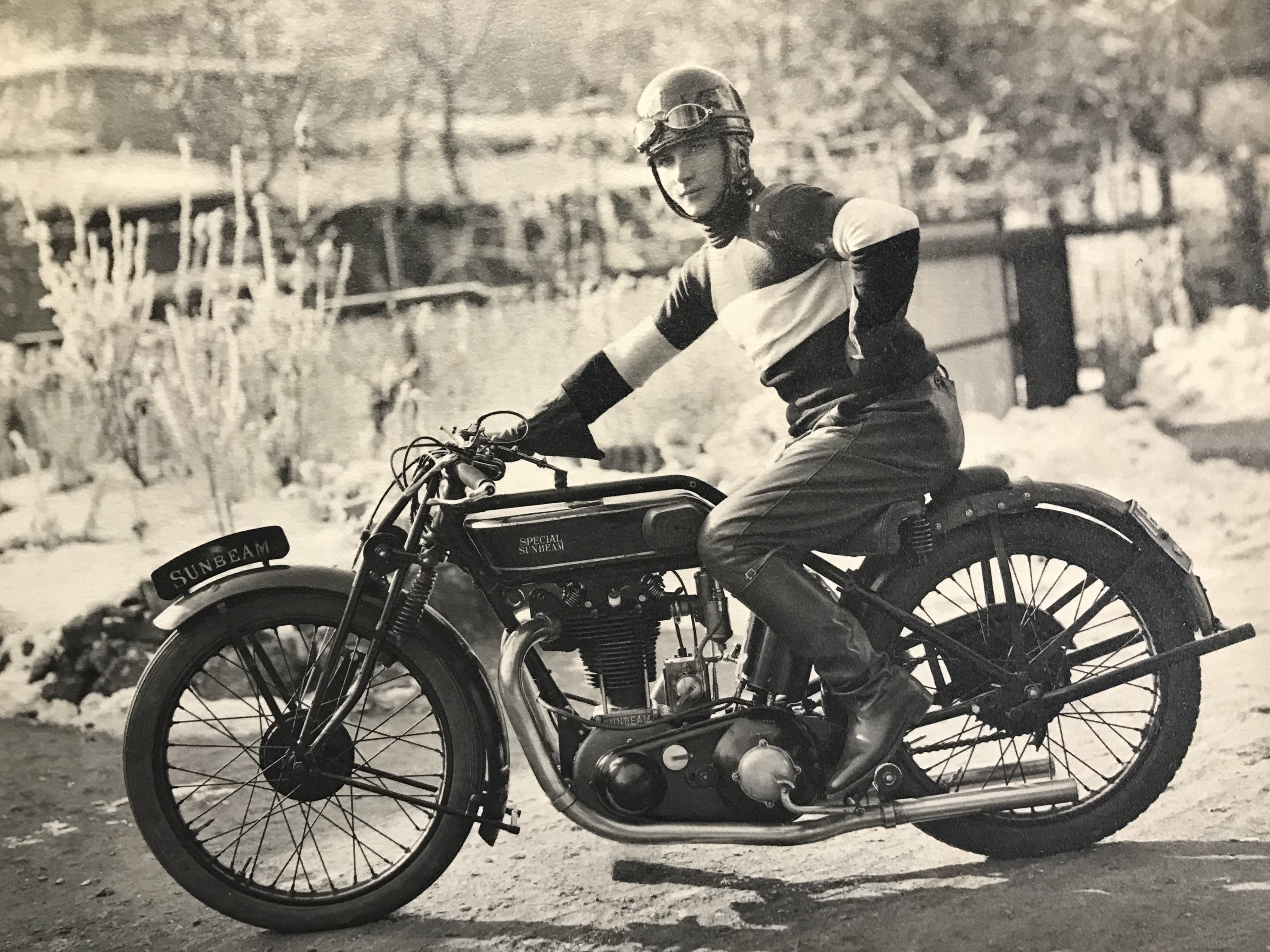 Mario Colombo in sella alla Sunbeam 500, foto celebrativa per la vittoria del campionato italiano 1928.